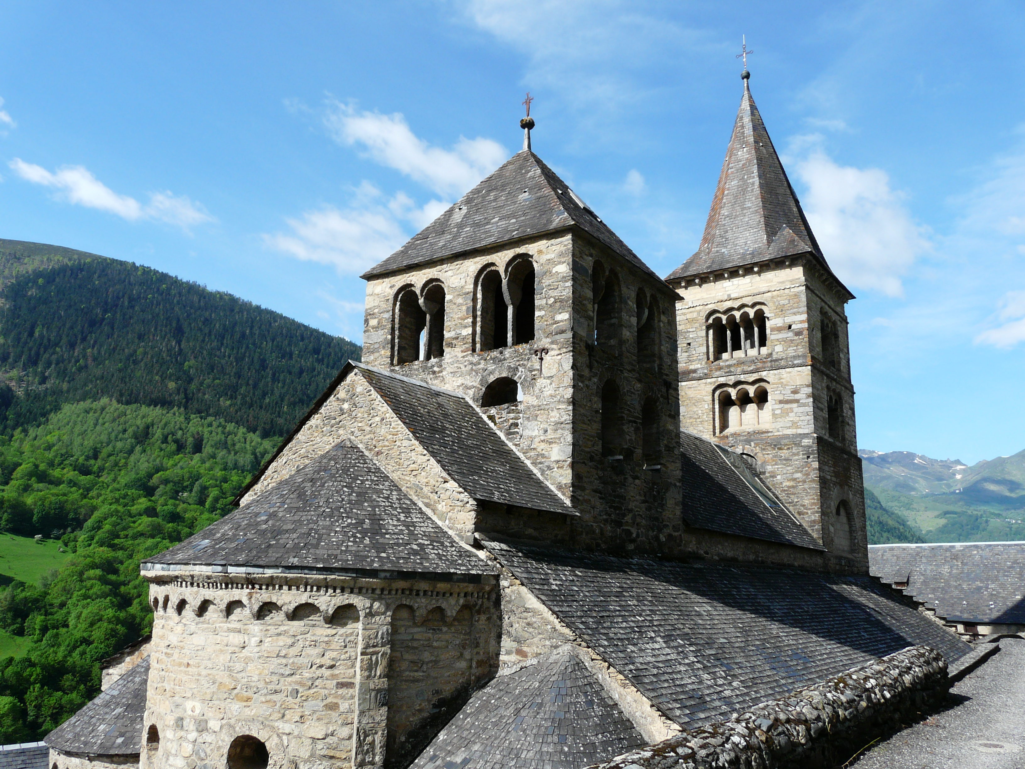 L'église de Saint-Aventin, Haute-Garonne, France.